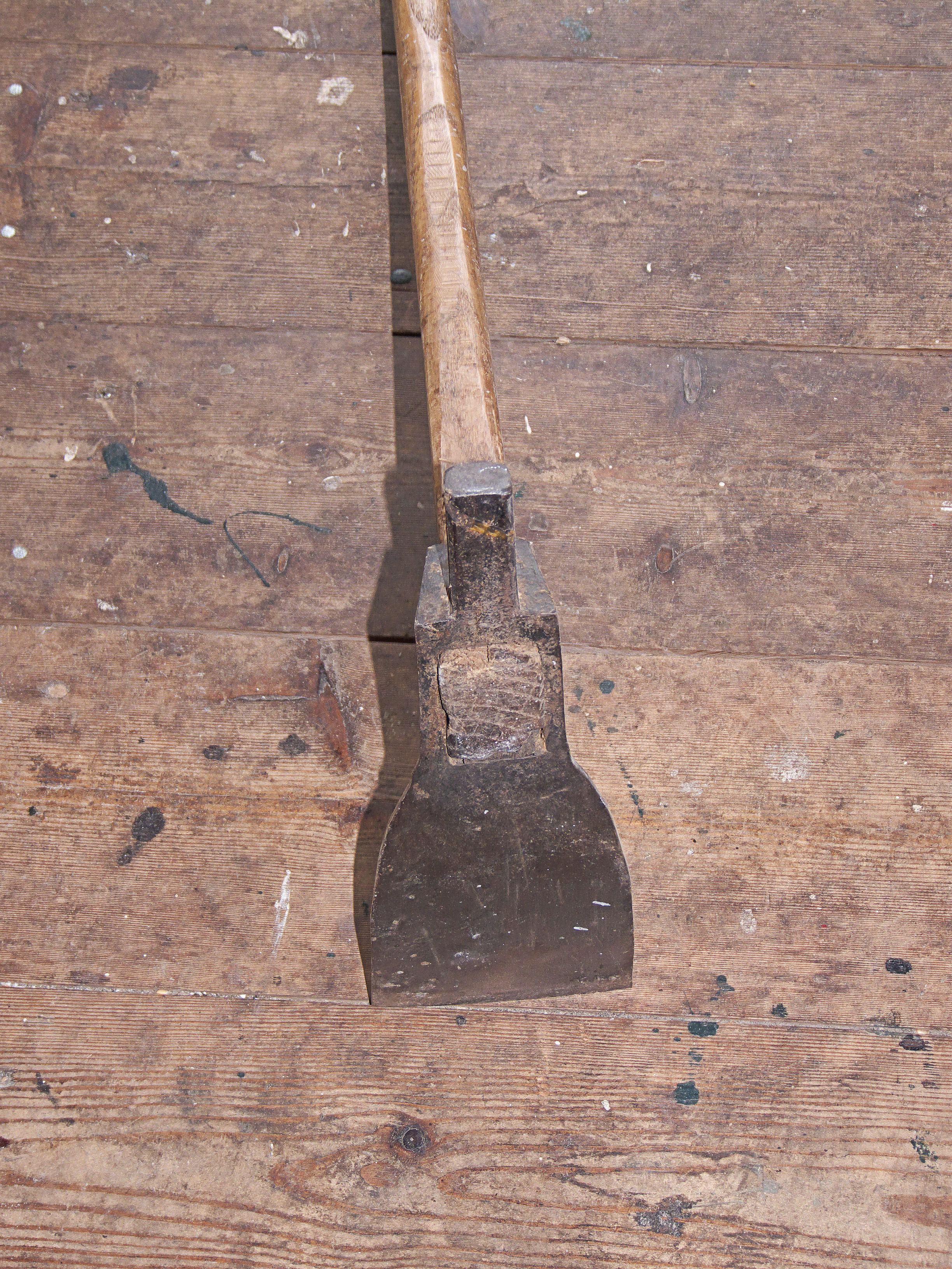 Dissel